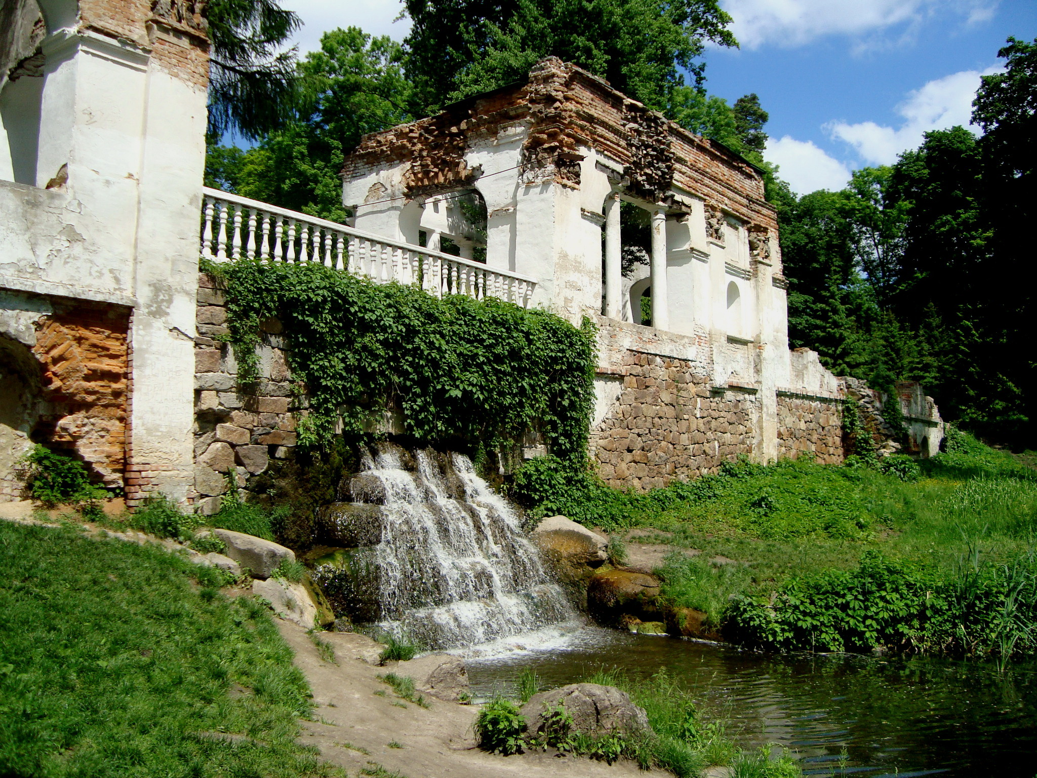 Парк "Олександрiя" та парковi споруди, Біла Церква, Сквирське шосе